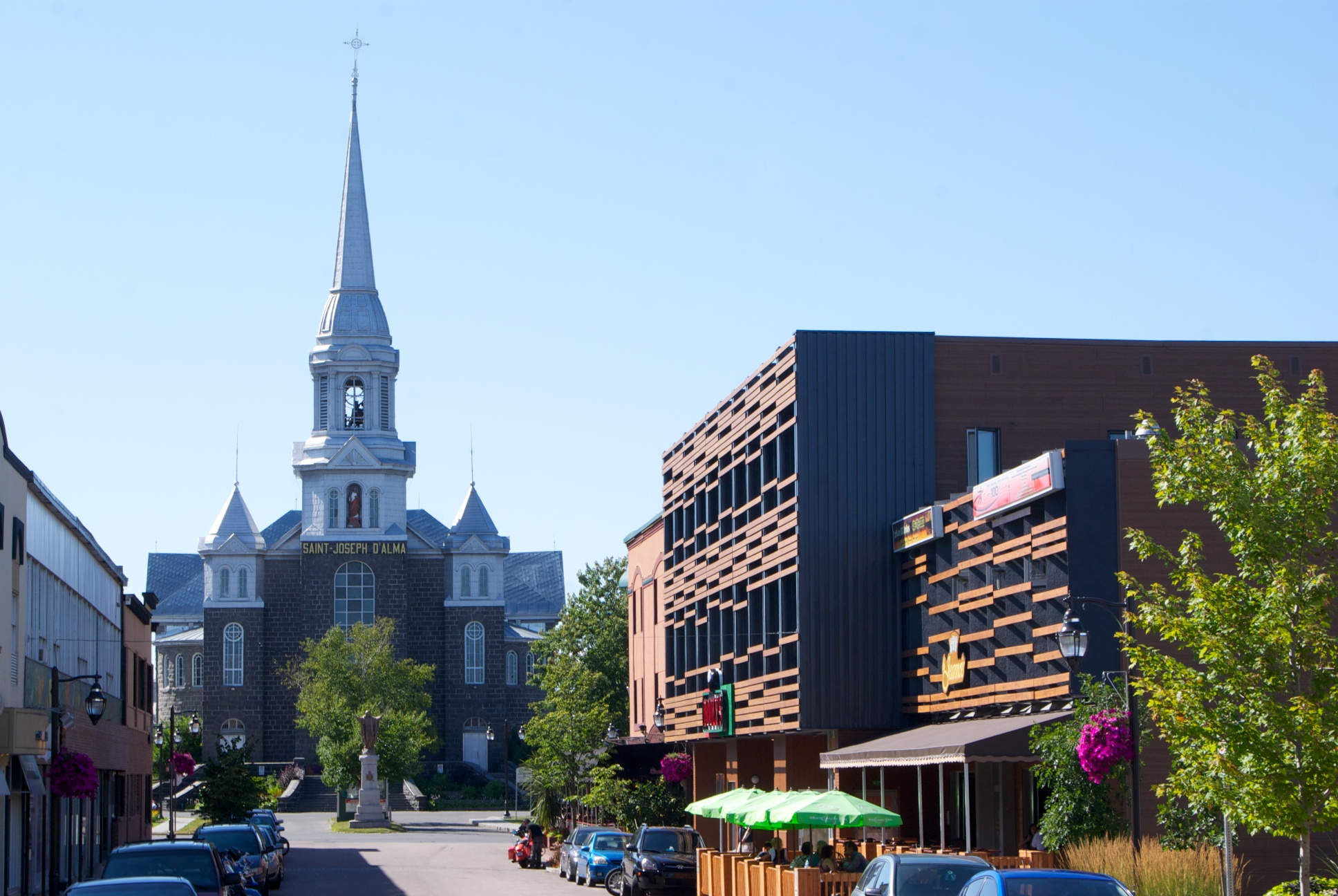 Rue Sacré-Coeur, centre-ville d'Alma, Québec